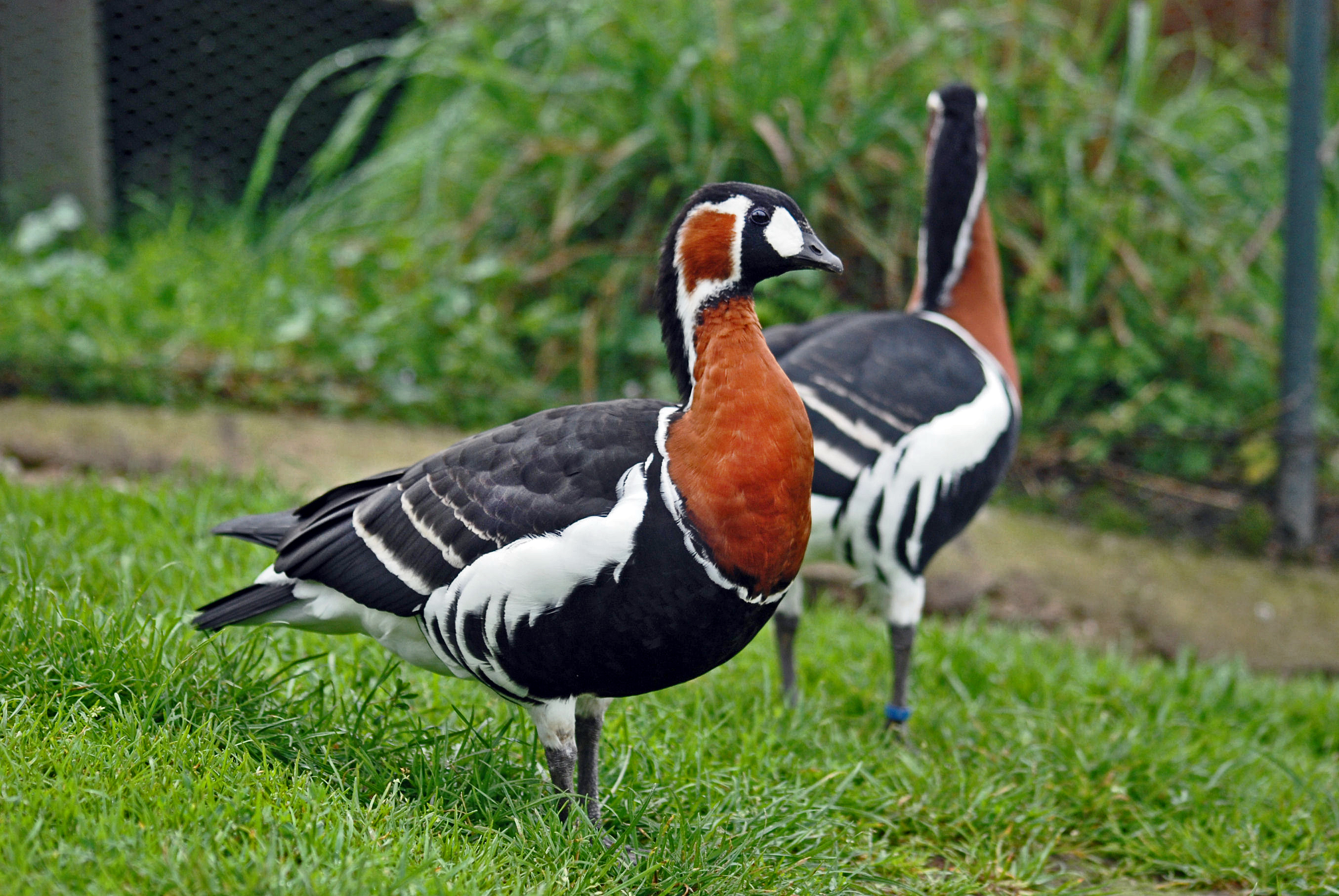 Branta ruficollis in Kadzidłowo